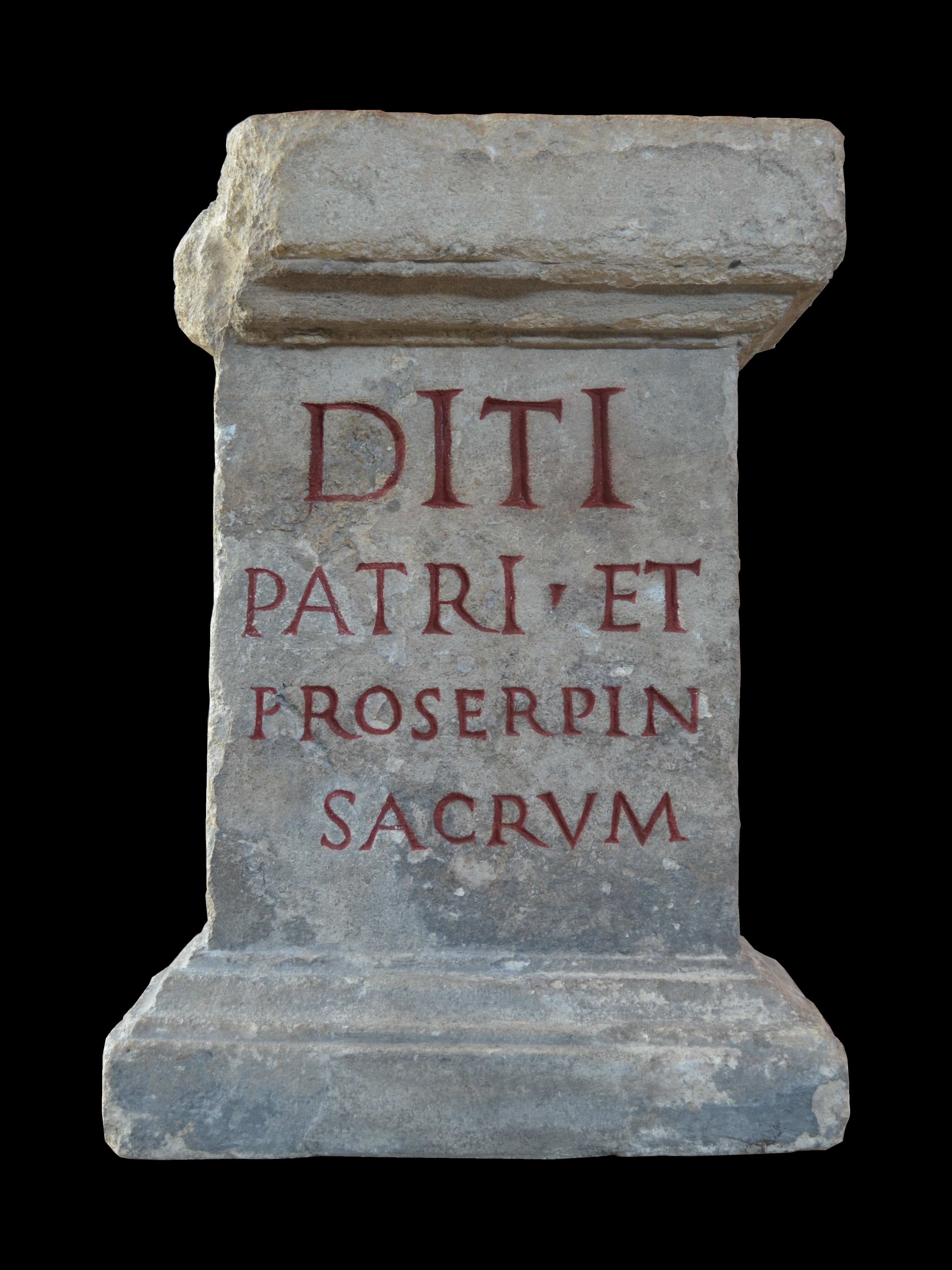 Musée romain-germanique de Cologne - Pierre votive au dieu Dis Pater et à sa femme Proserpine